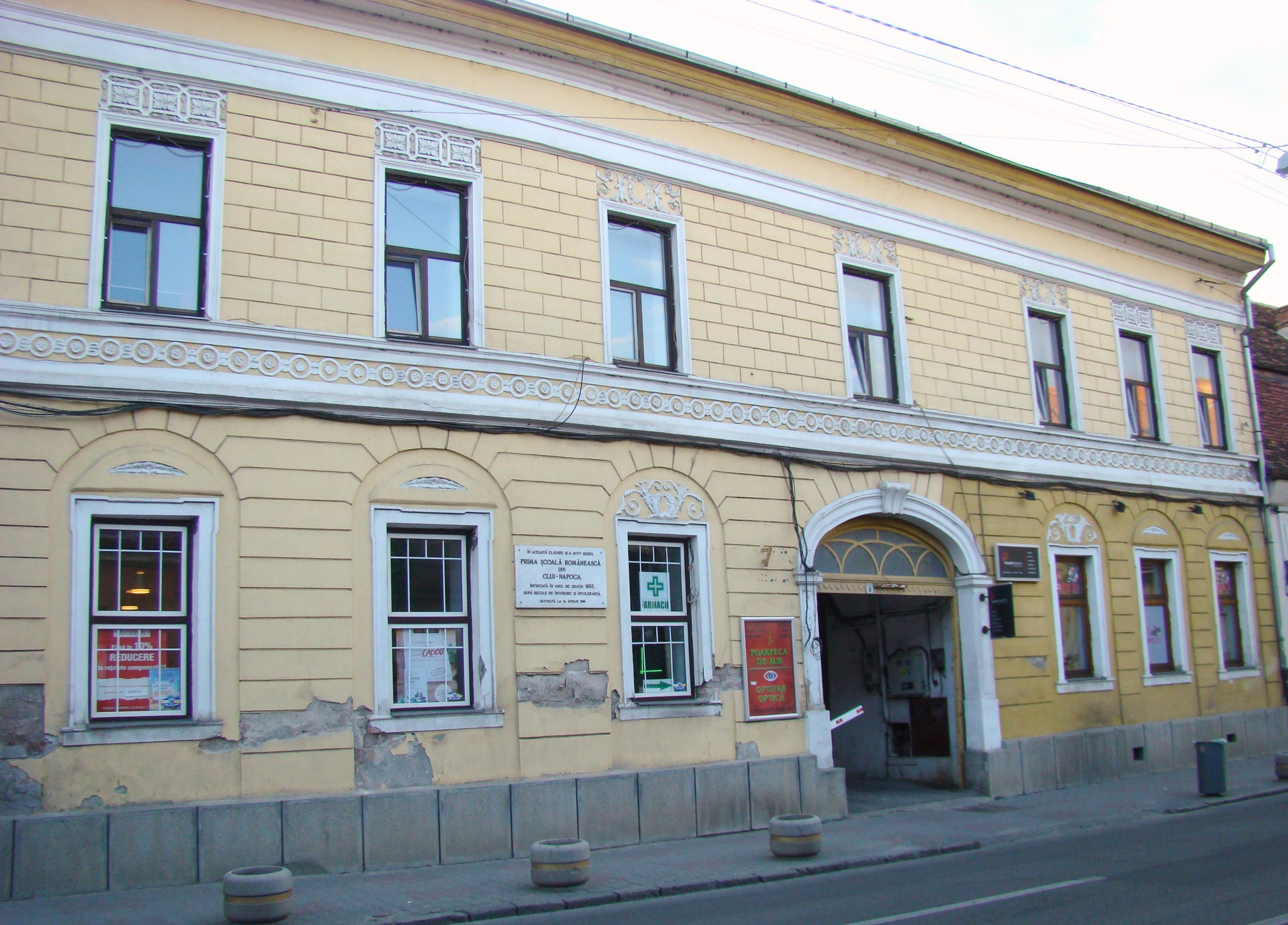 Clădire monument istoric, str. Napoca, nr.6-8